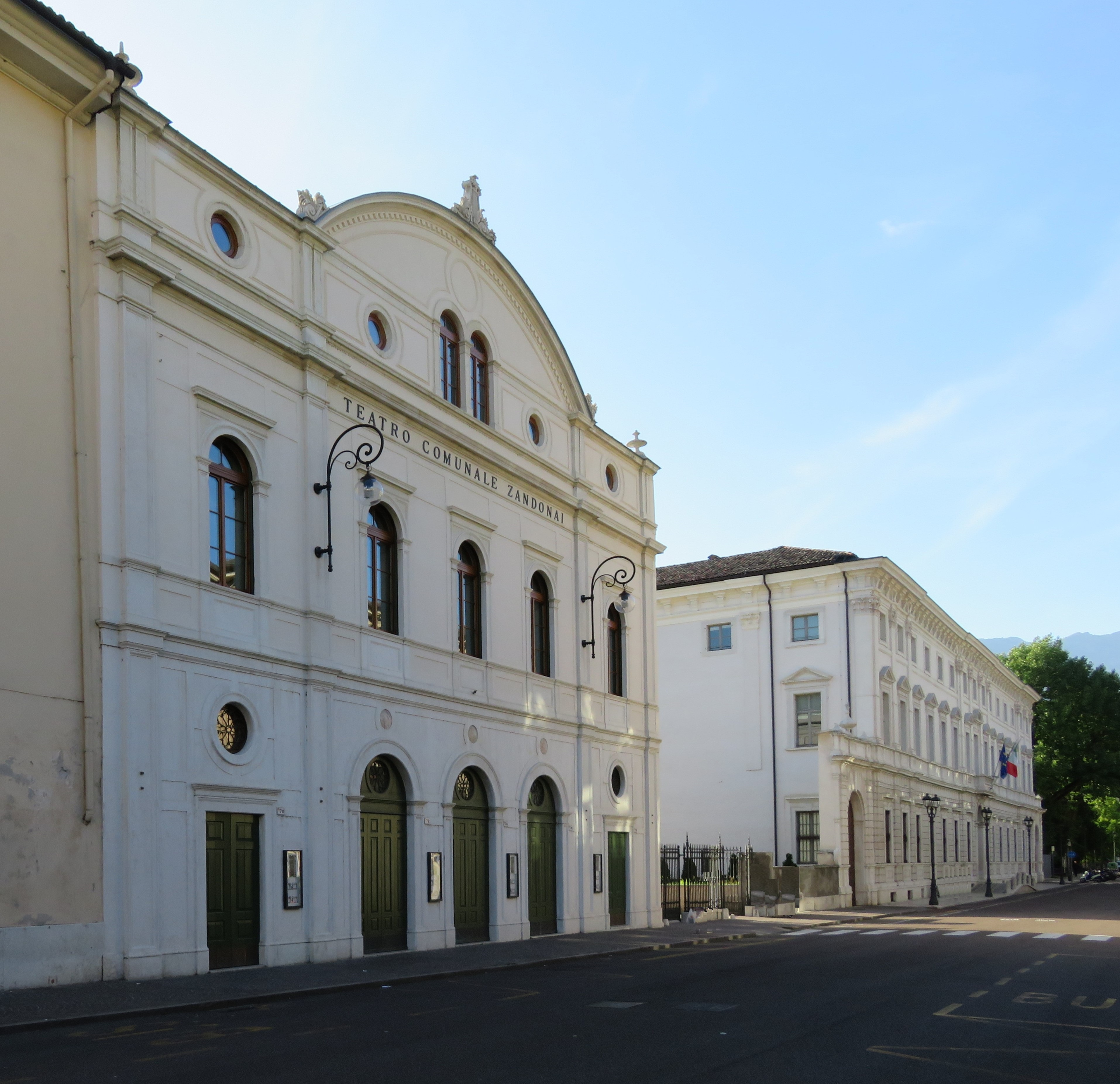 Teatro comunale Zandonai, facciata su corso Bettini, a Rovereto